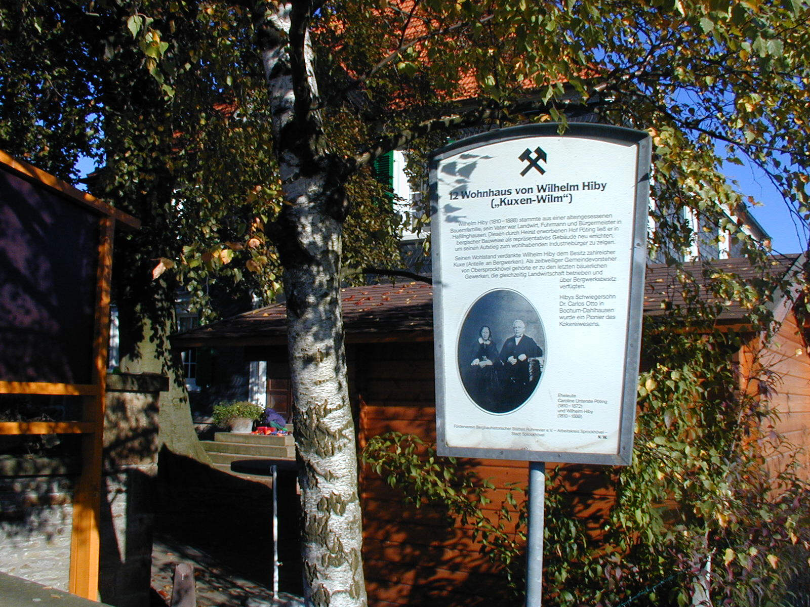 Wohnhaus des „Kuxen-Wilm“, Hof „Unterste Pöting“ This is a photograph of an architectural monument.